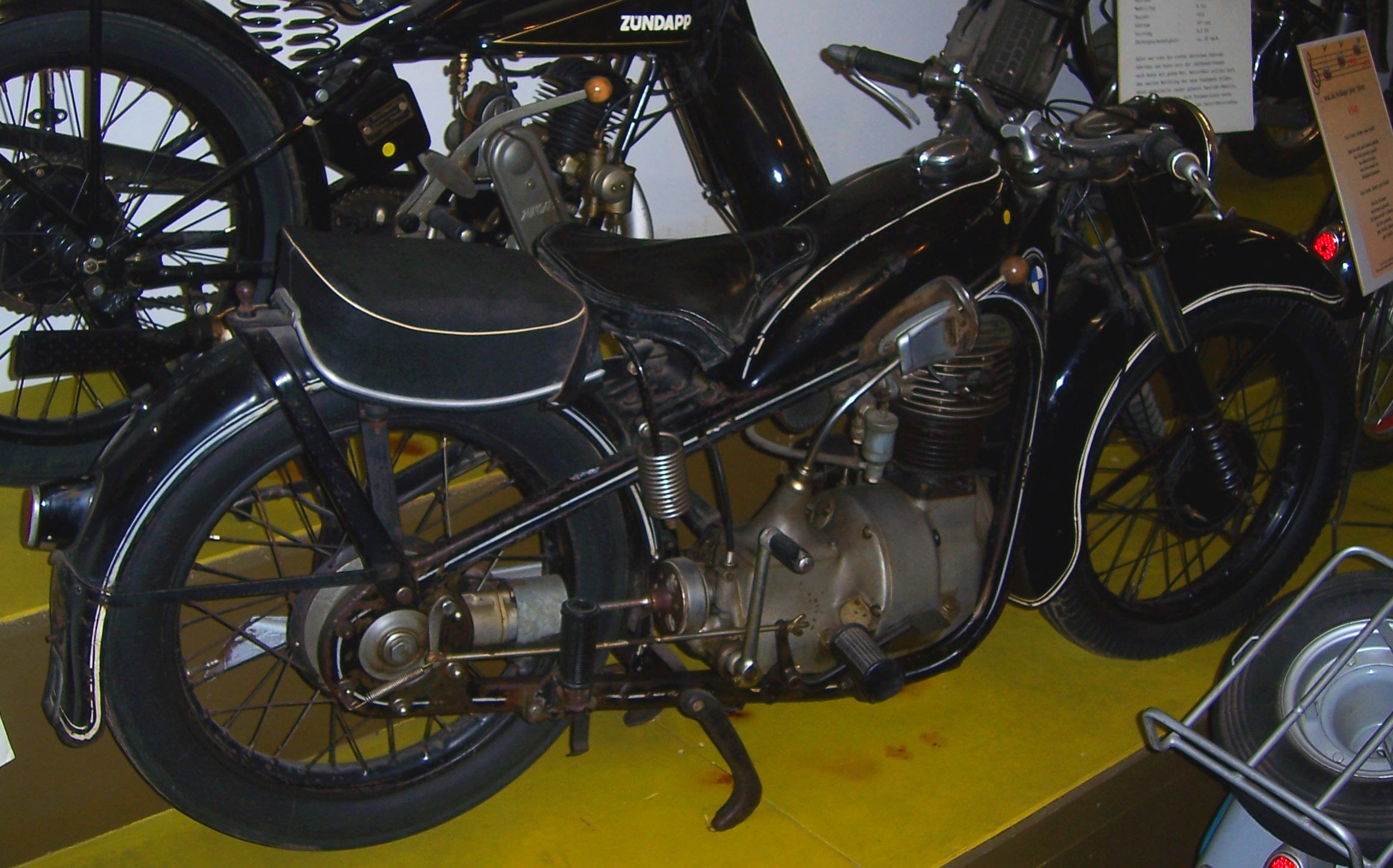 BMW R3 Fritz Busch Museum Wolfegg